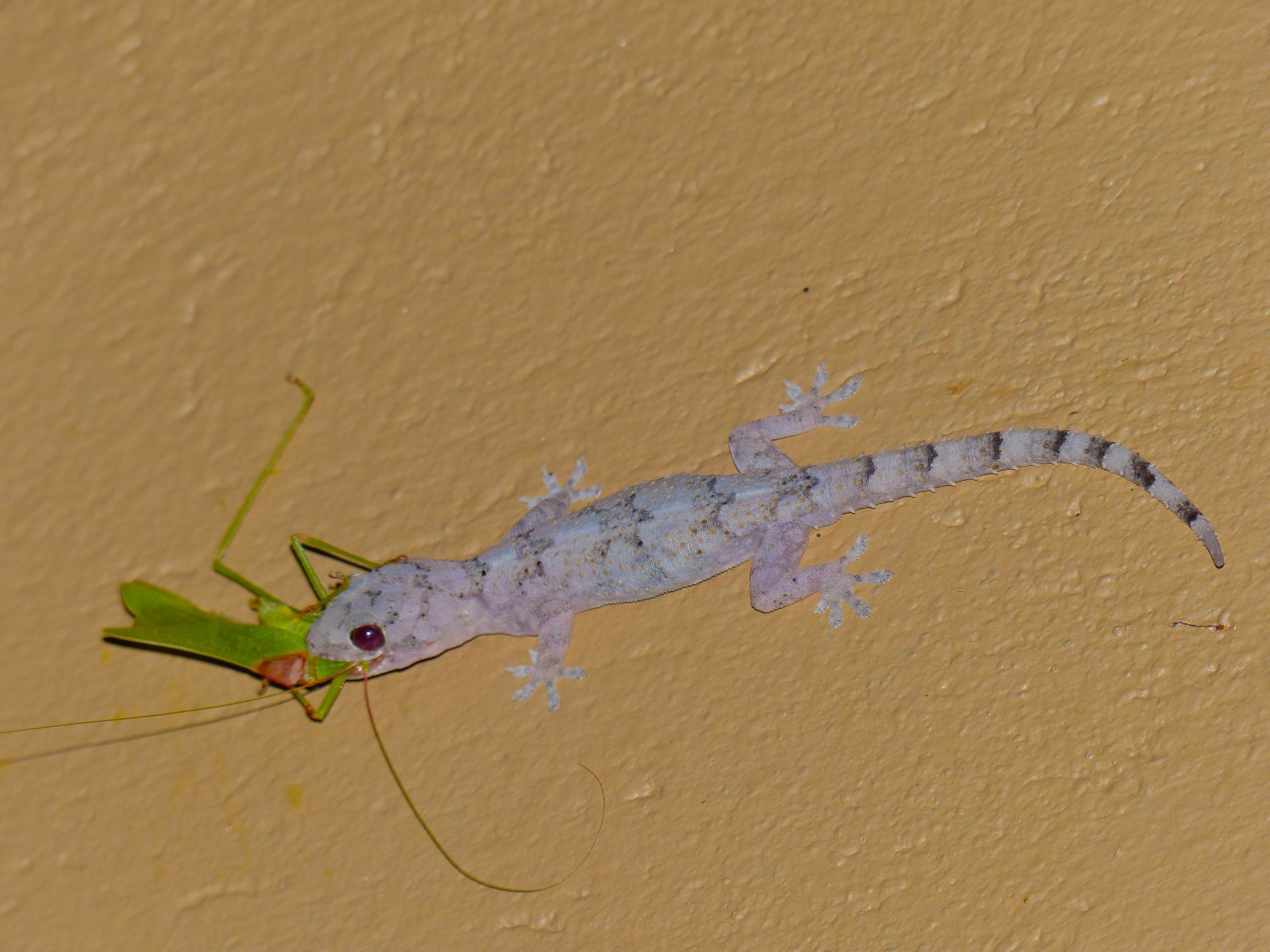 Letaba Camp, Kruger NP, SOUTH AFRICA